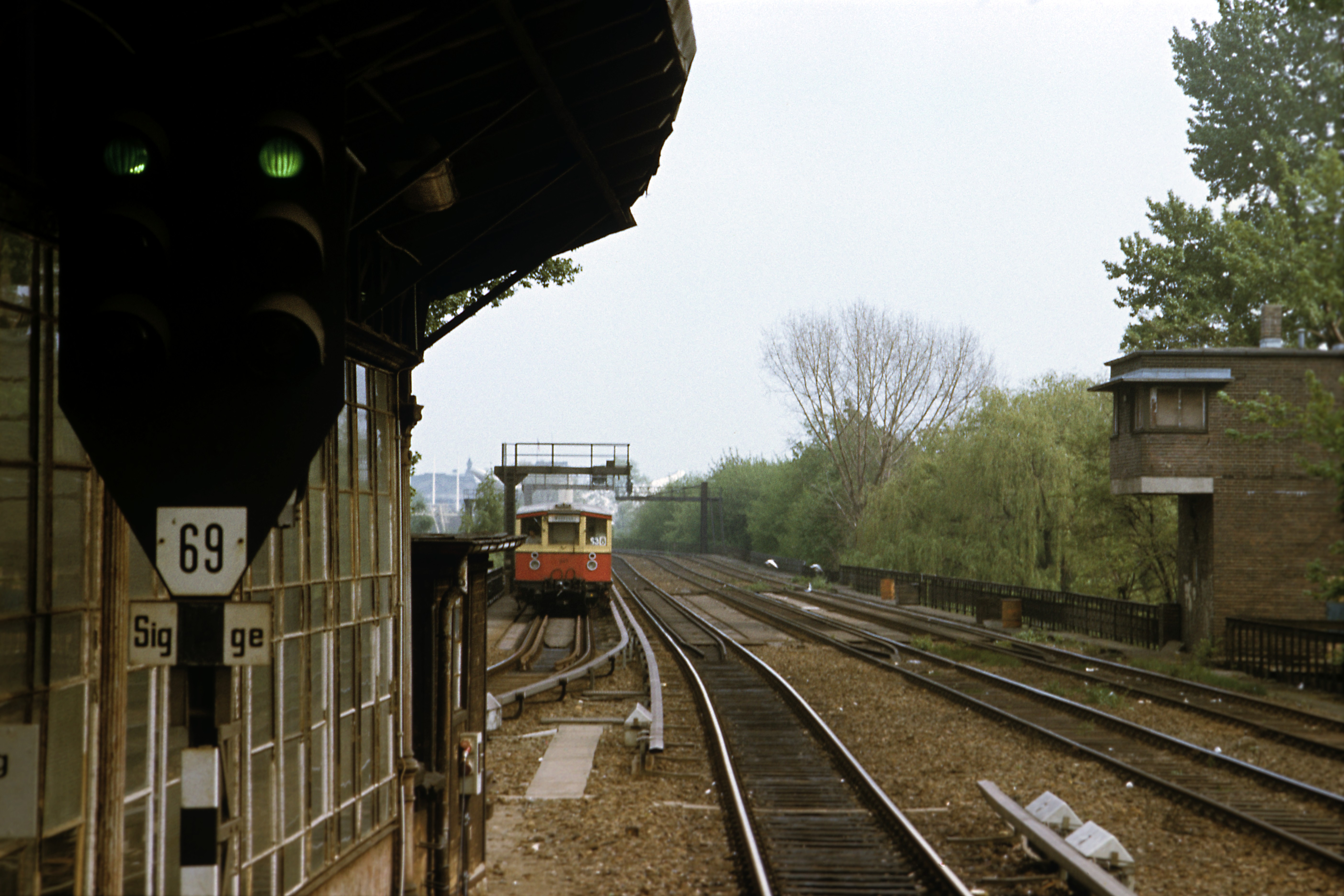 Stadtbahn Berlin, Blick Richtung Osten. Noch ist der automatische Streckenblock der Bauform AB 28 in Betrieb, erkennbar an den Sv-Signalschirmen ohne Blendenrelais. Rechts das Gebäude der Bk Brückenallee, die nur für die Fernbahn zuständig war und seit den 1960er Jahren außer Betrieb ist.